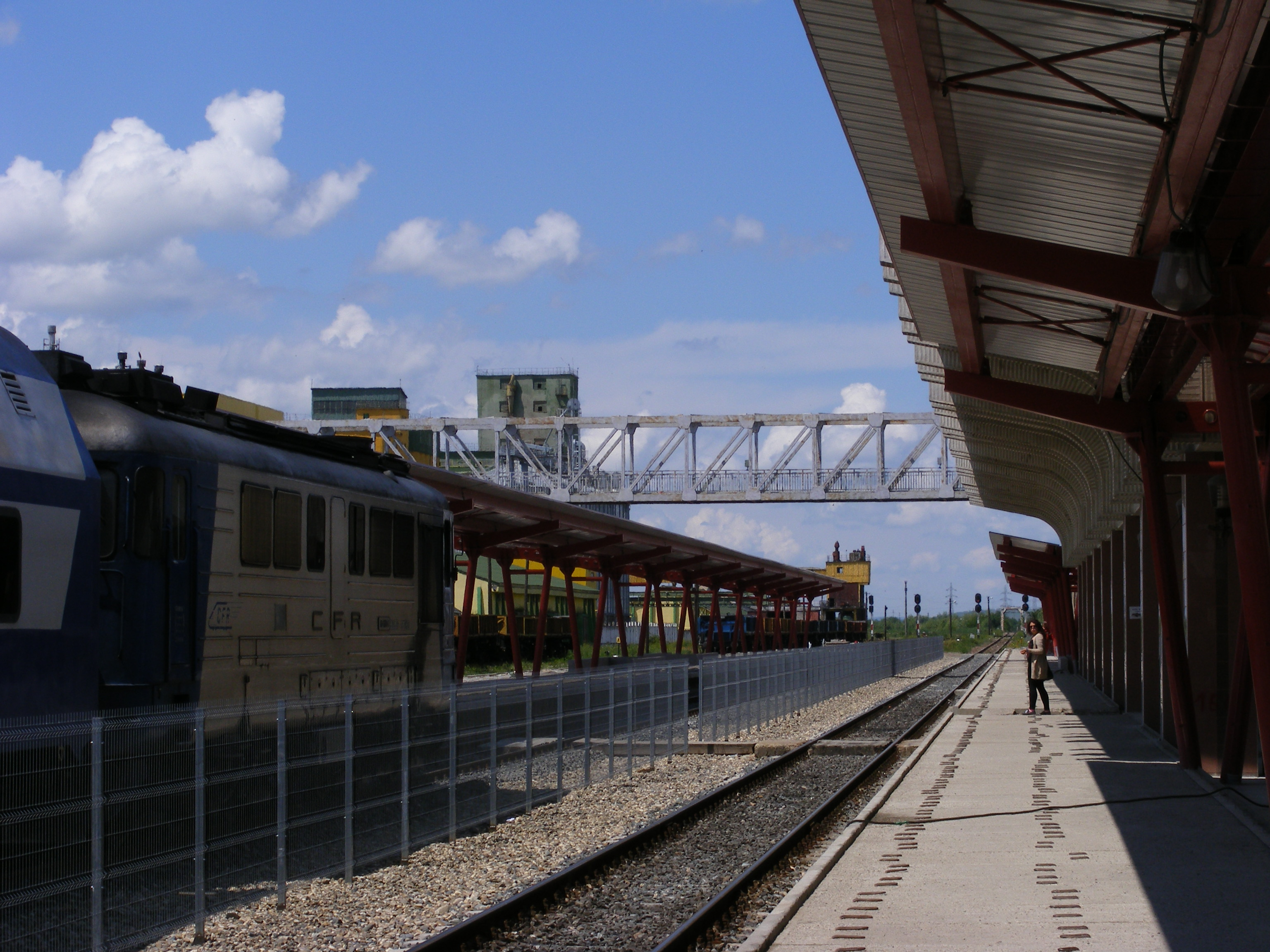 gara vaslui in modernizare